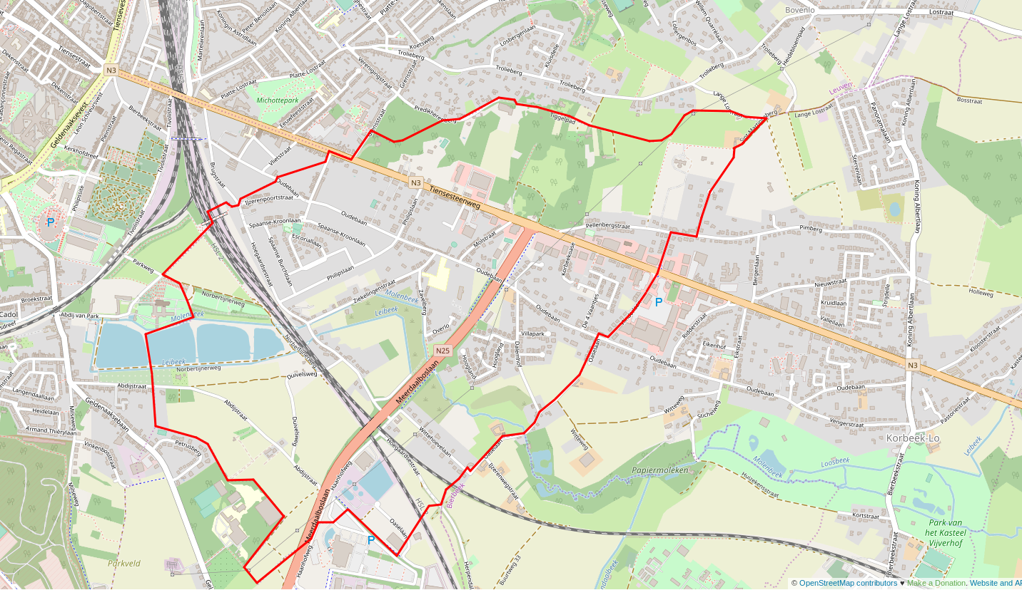 Kaart met grenzen van Leuvens Korbeek-Lo (achtergrond: openstreetmap).